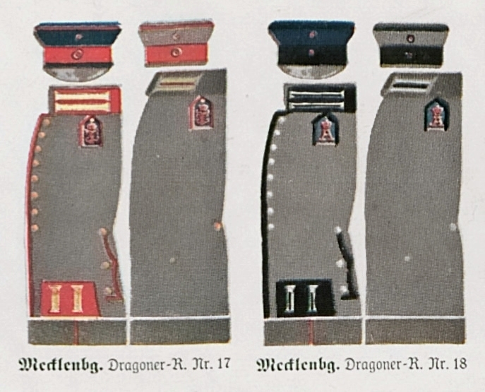 Dragoner-Regiment Nr. 17 Uniform Feldgrau